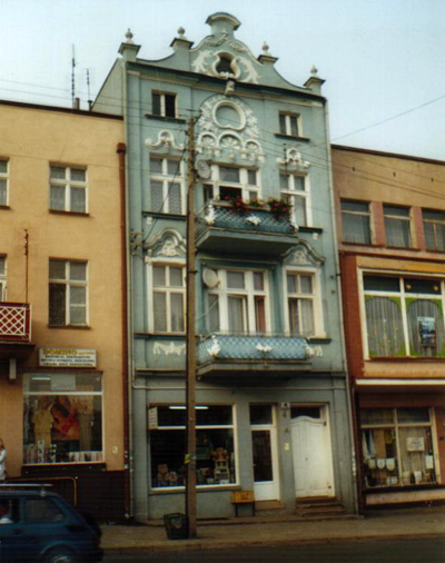 Town Square, Nowe, Świecie county, Poland